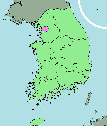 ソウル地域の地図